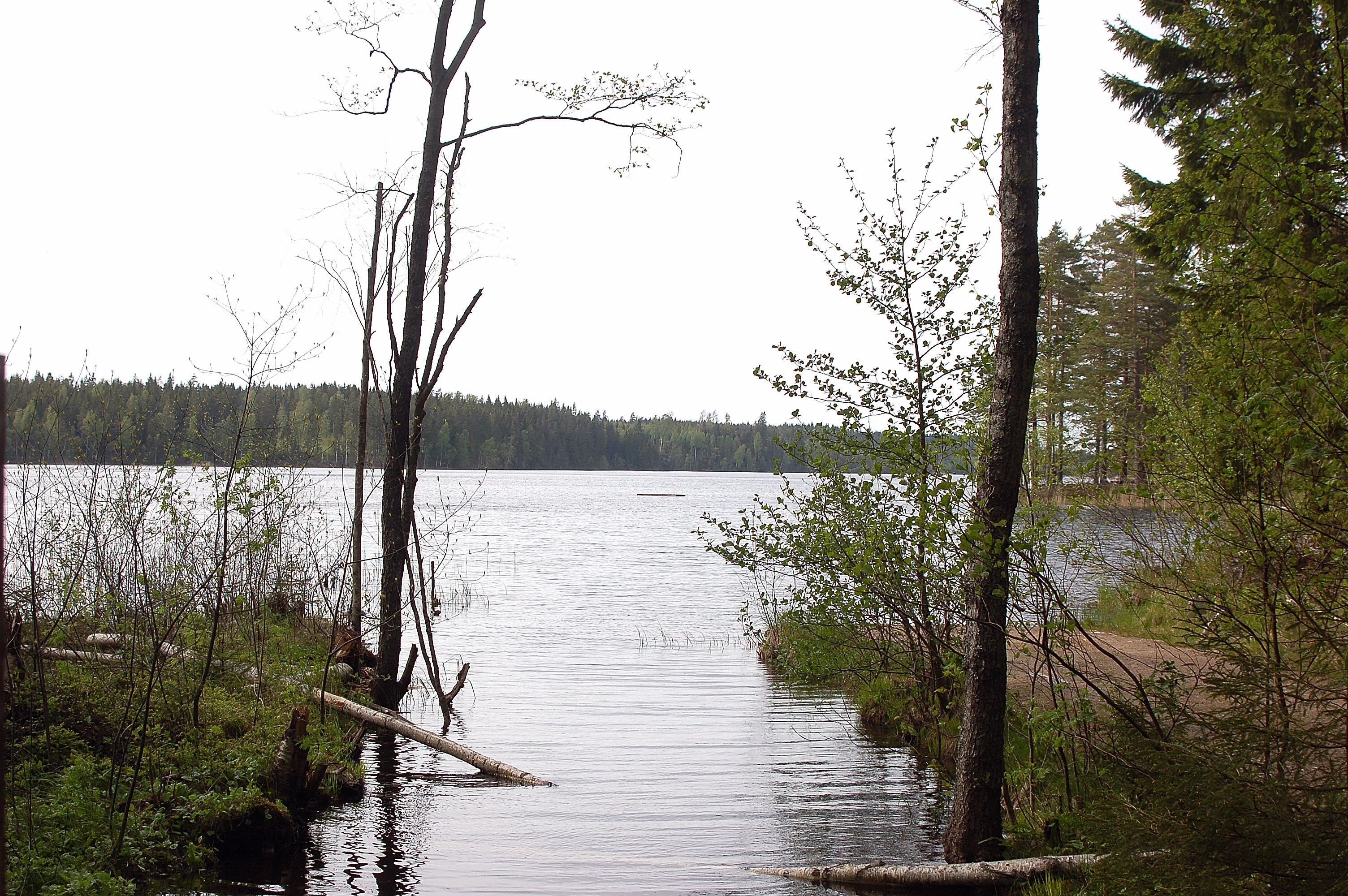 Sirsjön Svartå vid södra utloppet.